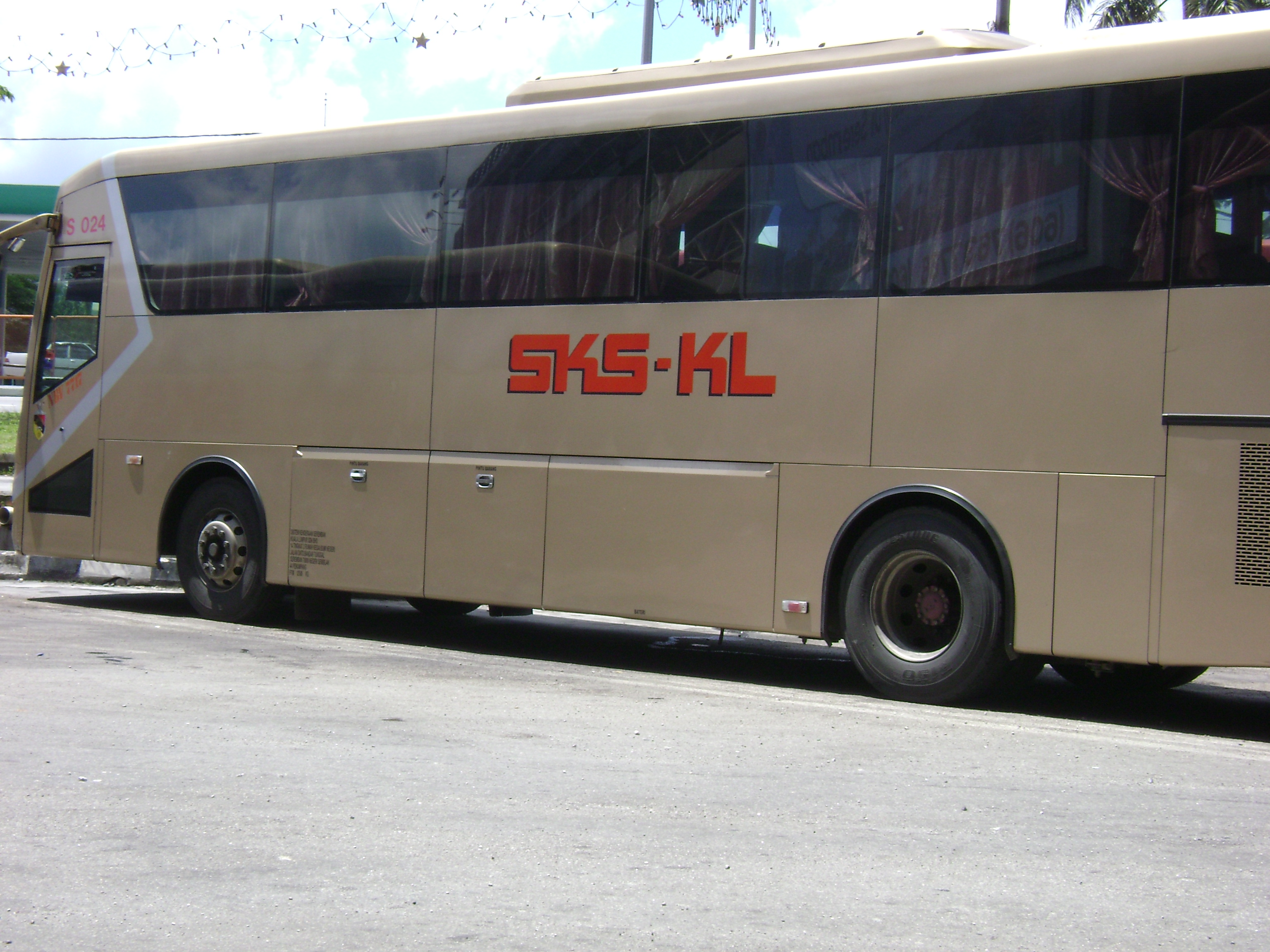 SKS Transnasional